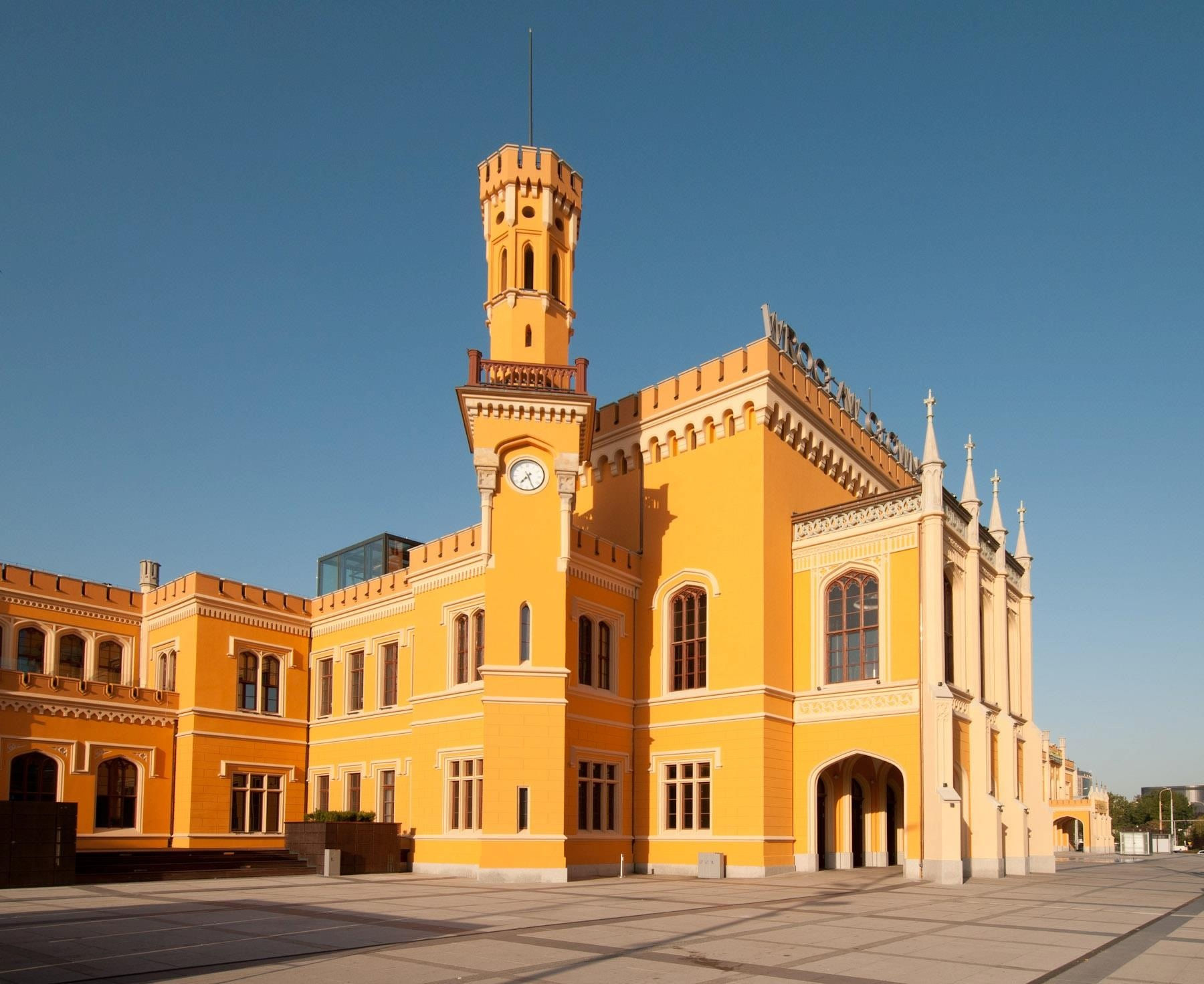 Dworzec PKP Wrocław Główny po remoncie.